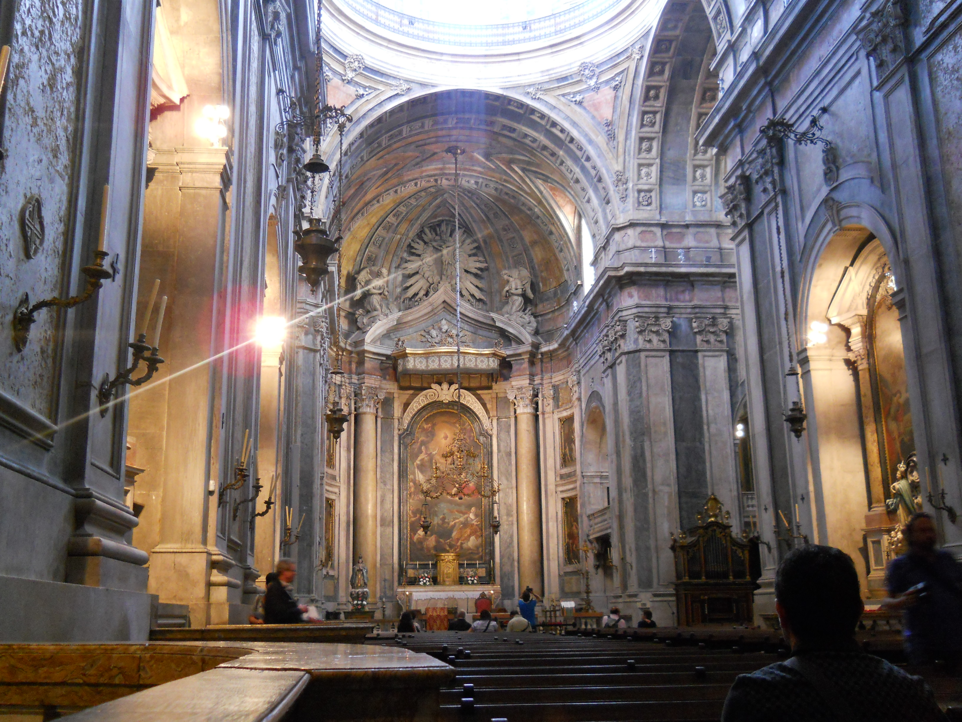 Lisbon Portugal 128 Estrela Basilica